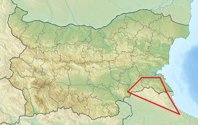 Strandża